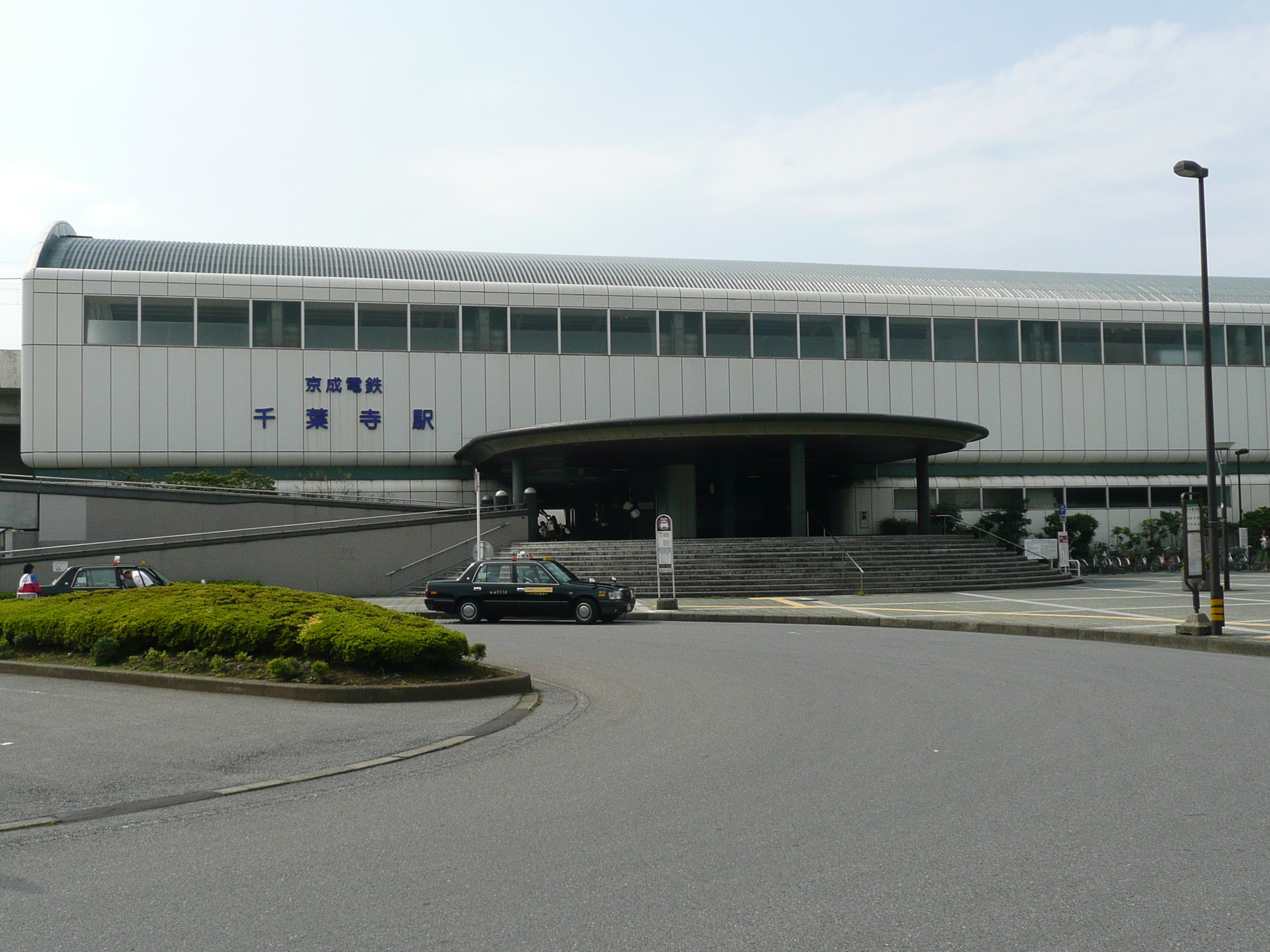 千葉寺駅